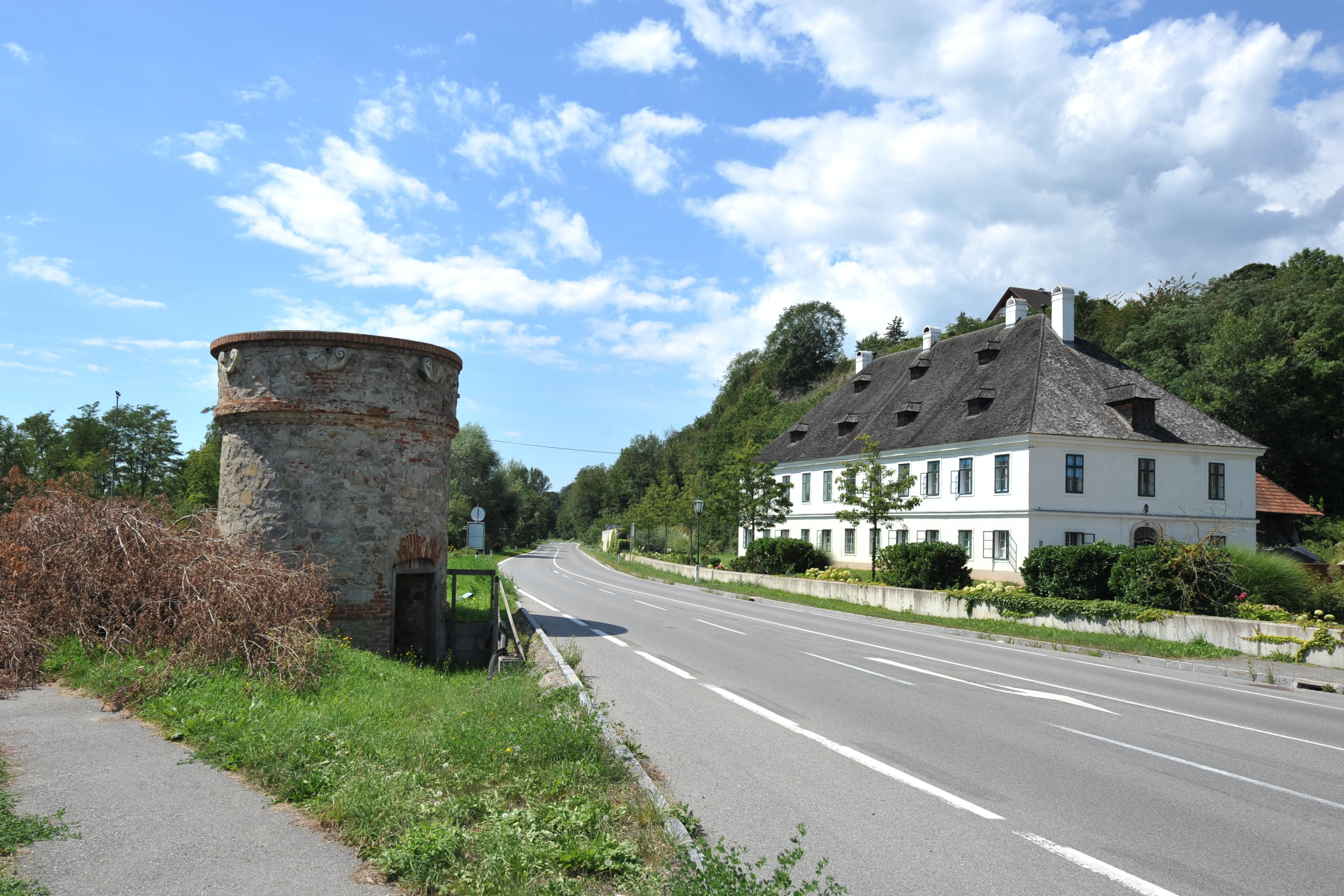 Emmersdorf an der Donau: Schlossanlage Luberegg